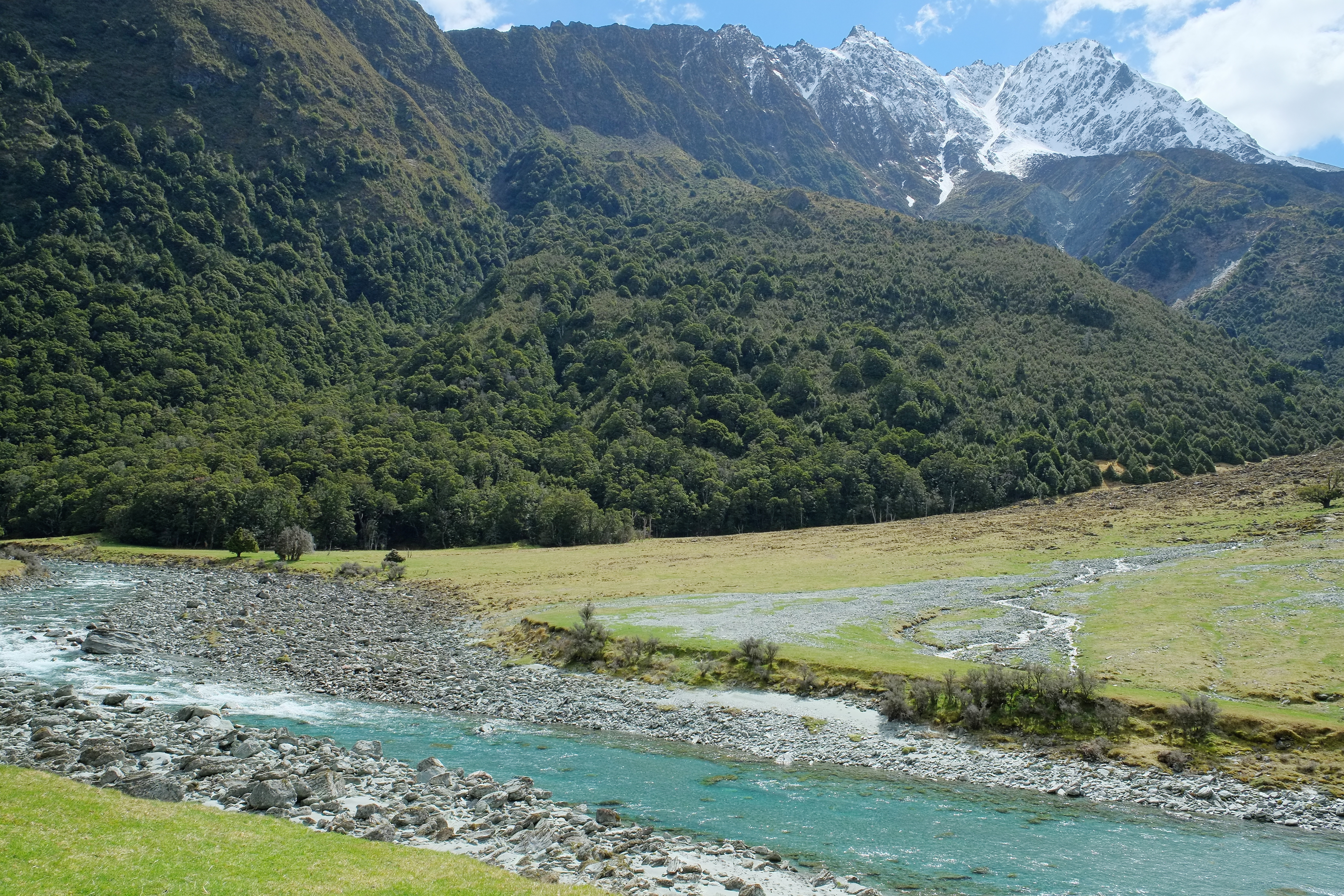 Matukituki River West Branch